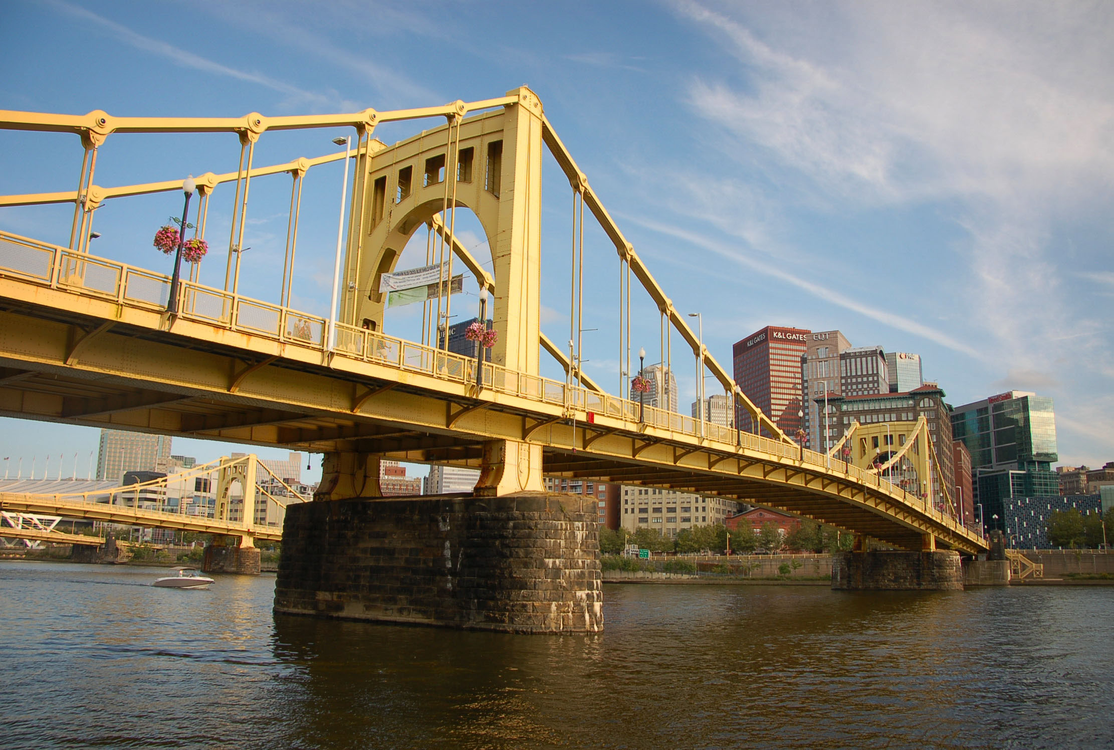 Three Sisters (Pittsburgh)